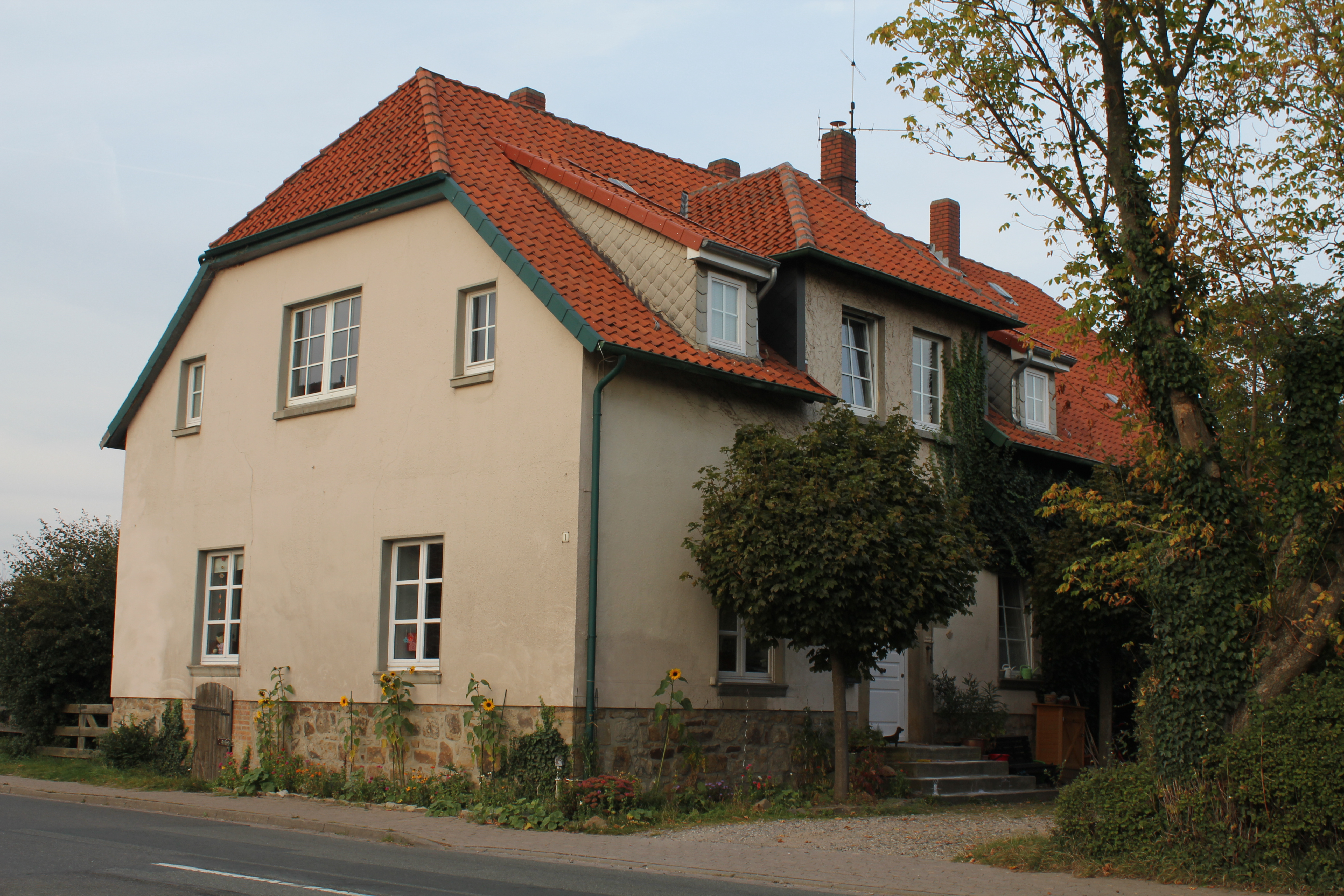 Alte Rentei in Bredenbeck